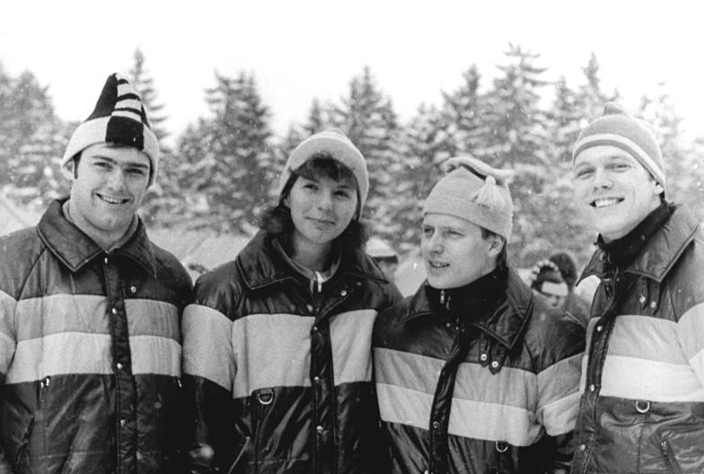 Wilfried Vogel, Steffi Martin, Jörg Hoffmann, Jochen Pietzsch ADN-ZB Schaar 27.3.1983-Oberhof: DDR-Meisterschaften im Rennschlittensport-Die neuen DDR-Meister sind vlnr: Wilfried Vogel (ASK), Steffi Martin (SCT) und im Doppel Jörg Hoffmann und Jochen Pietzsch (ASK).